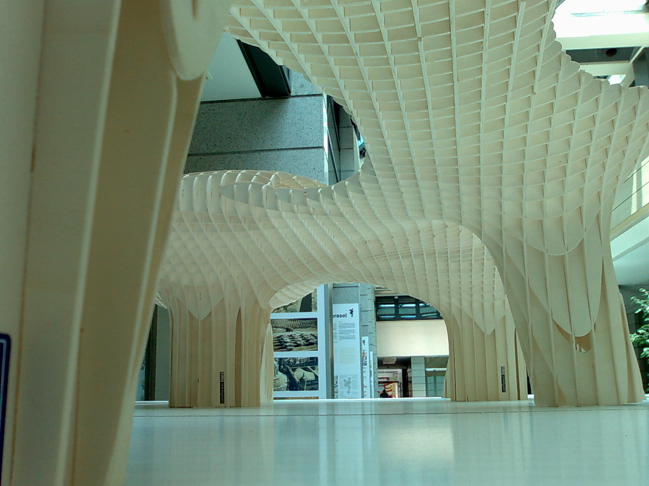 Maqueta del futuro Metropol Parasol (vista desde el interior) que formará parte de la Plaza de la Encarnación en Sevilla (España).